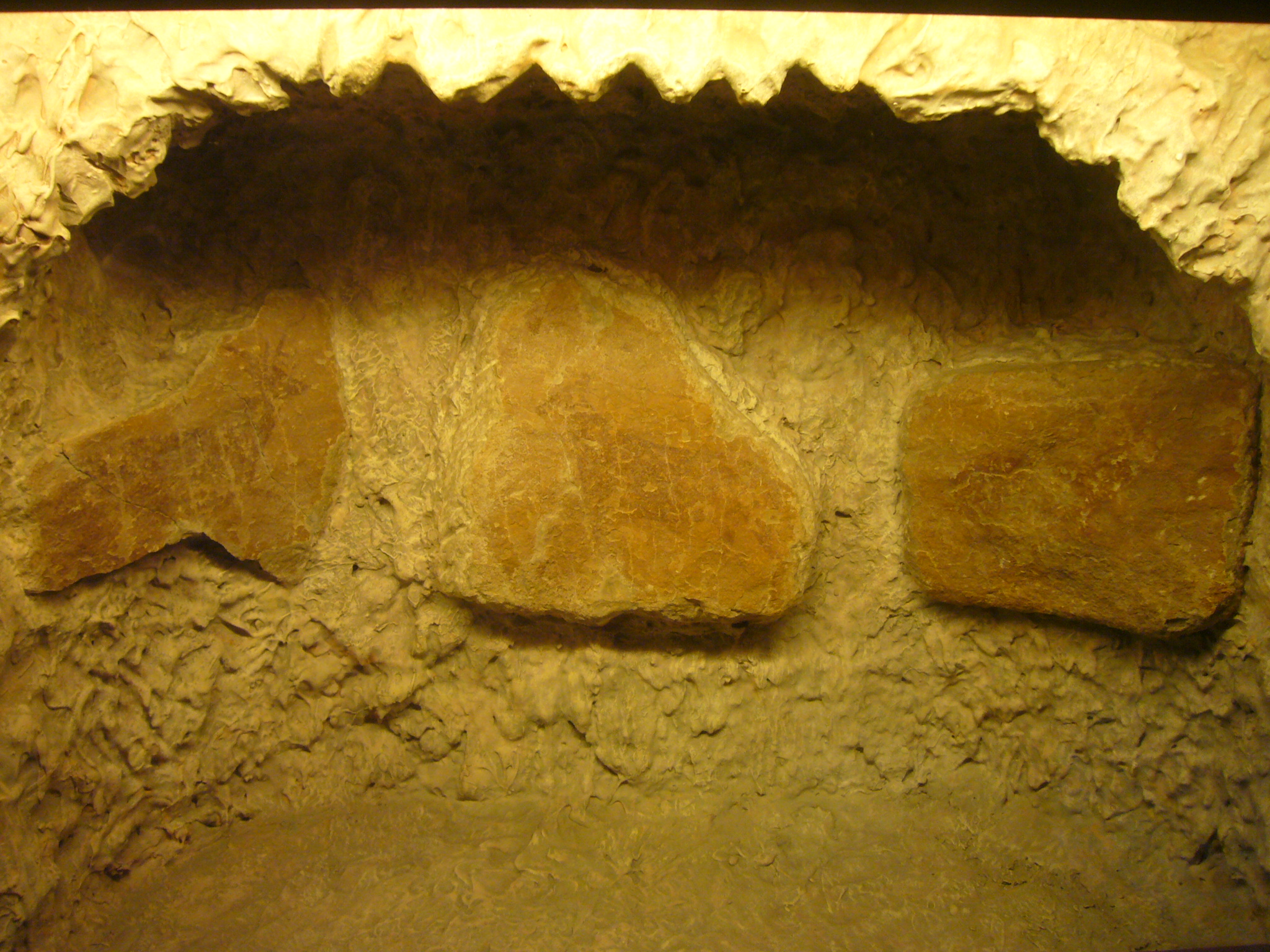 Pintures de la Cova dels Moros exposades al Museu d'Arqueologia de Catalunya (Barcelona). Foren descobertes per Joan Cabré el 1903 al barranc de Calapatar de Cretes (Matarranya). Van ser les primeres pintures a ser identificades com art rupestre llevantí. Hi apareixen 3 cérvols que anaven acompanyats d'un bovíd i arquers.